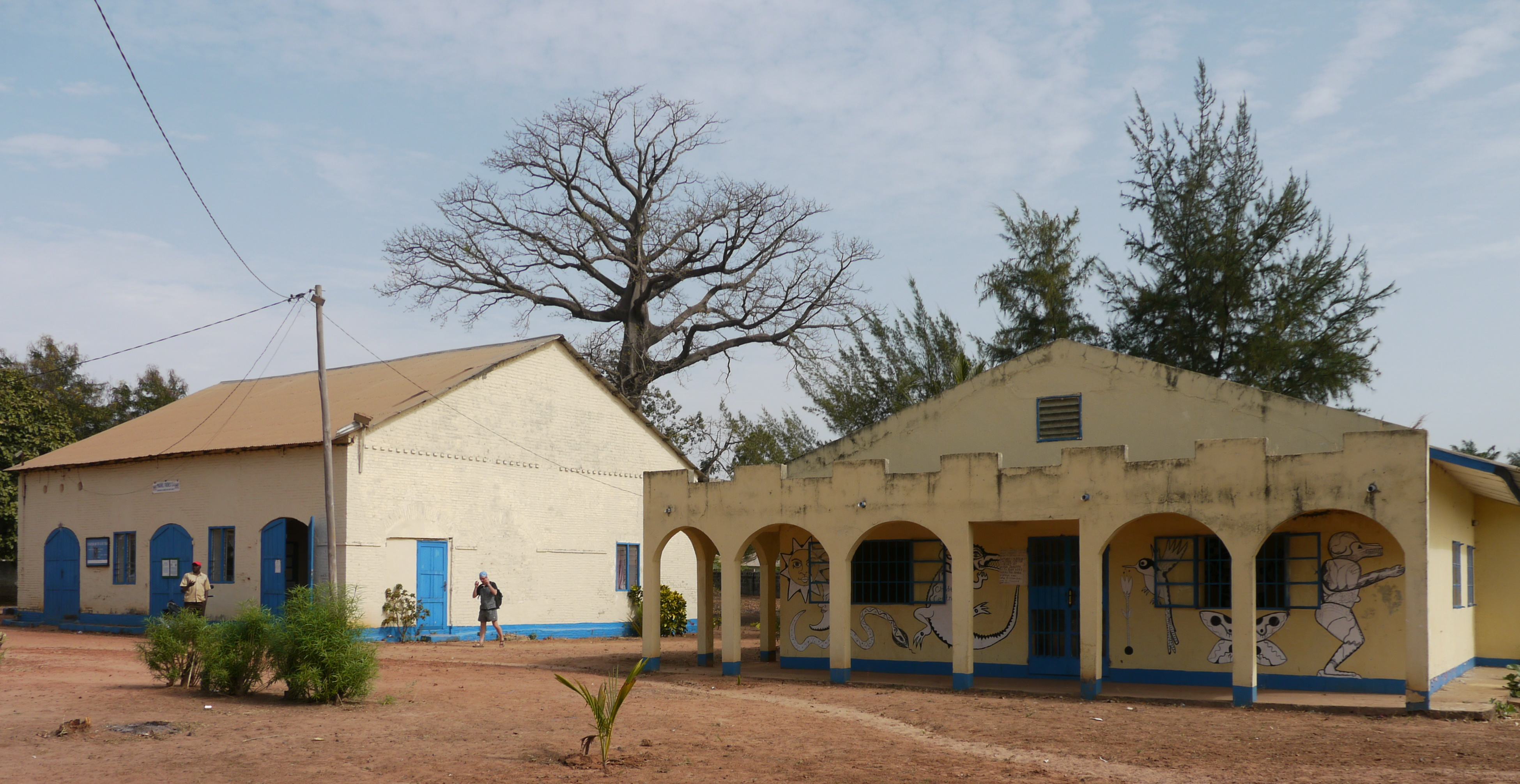 GambiaRoots012